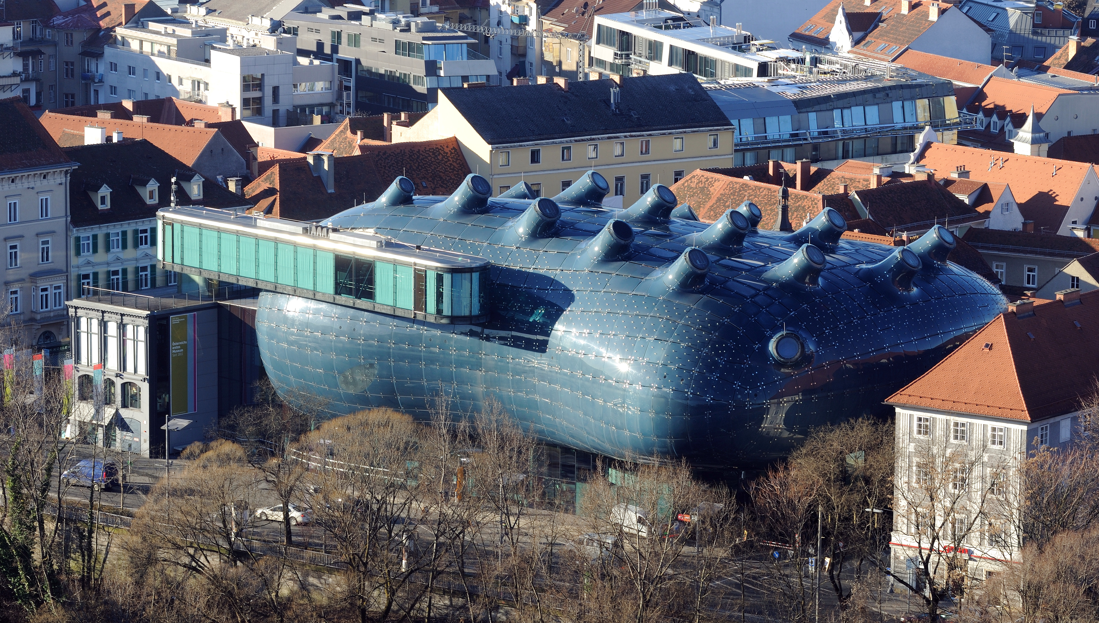 Graz: Kunsthaus